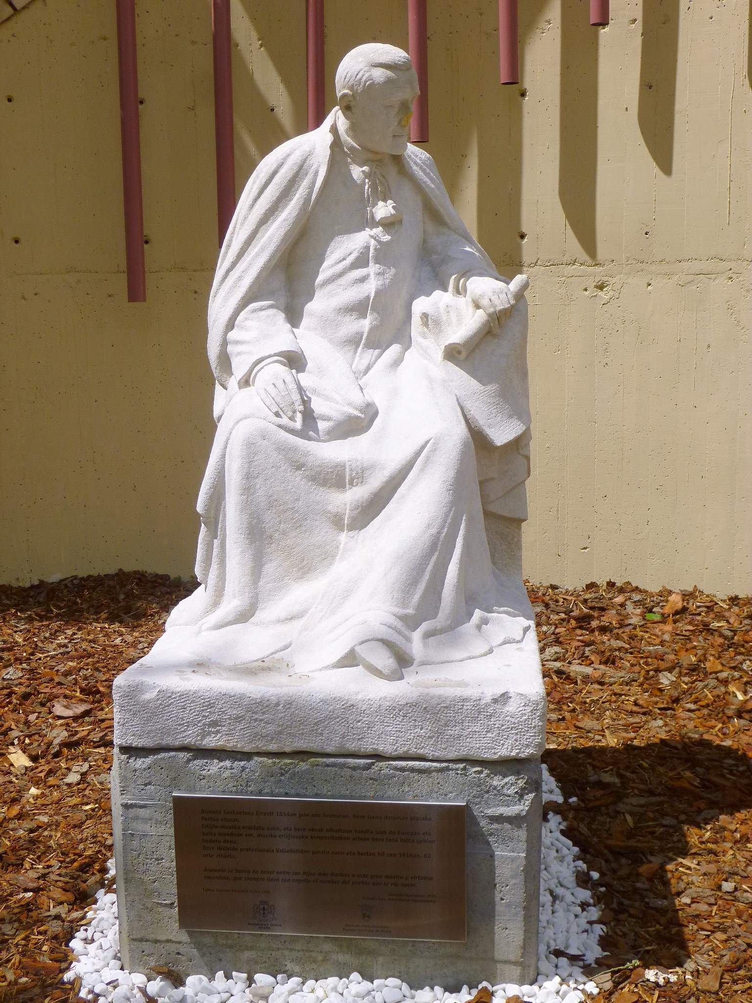 Monumento al músico Vicente Goicoechea y Errasti en su Ibarra de Aramayona natal (Álava)